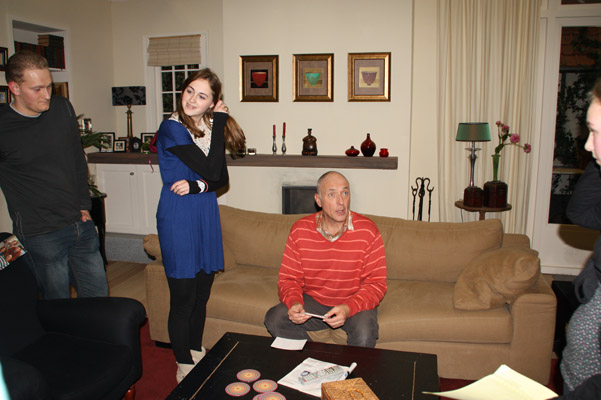 Alfred van den Heuvel tijdens een opname van 'Kinderen geen bezwaar'. Hij gaat met mensen op de foto en deelt handtekeningen uit. Links van hem Céline Purcell.